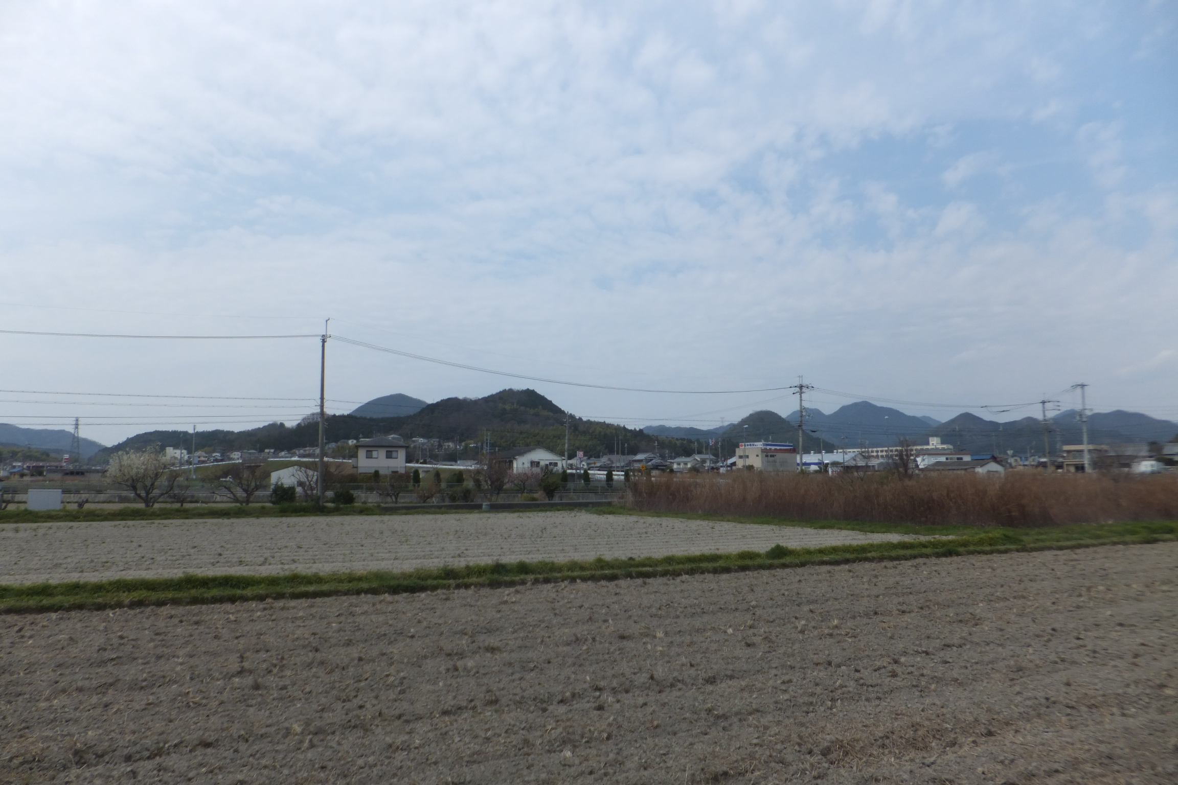 兵庫県神崎郡福崎町西治